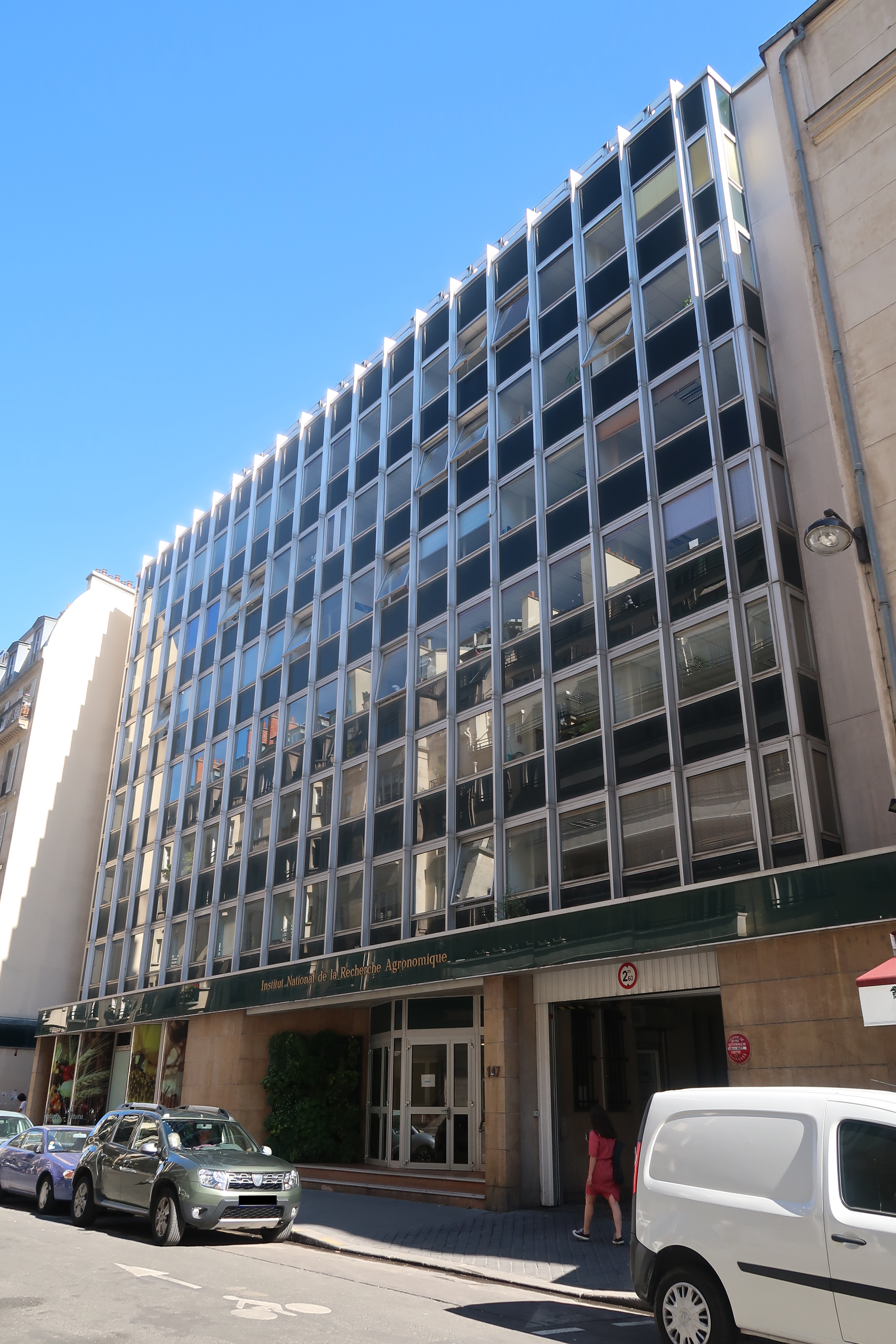 Siège de l'Institut national de la recherche agronomique, 107 rue de l'Université (Paris, 7e).